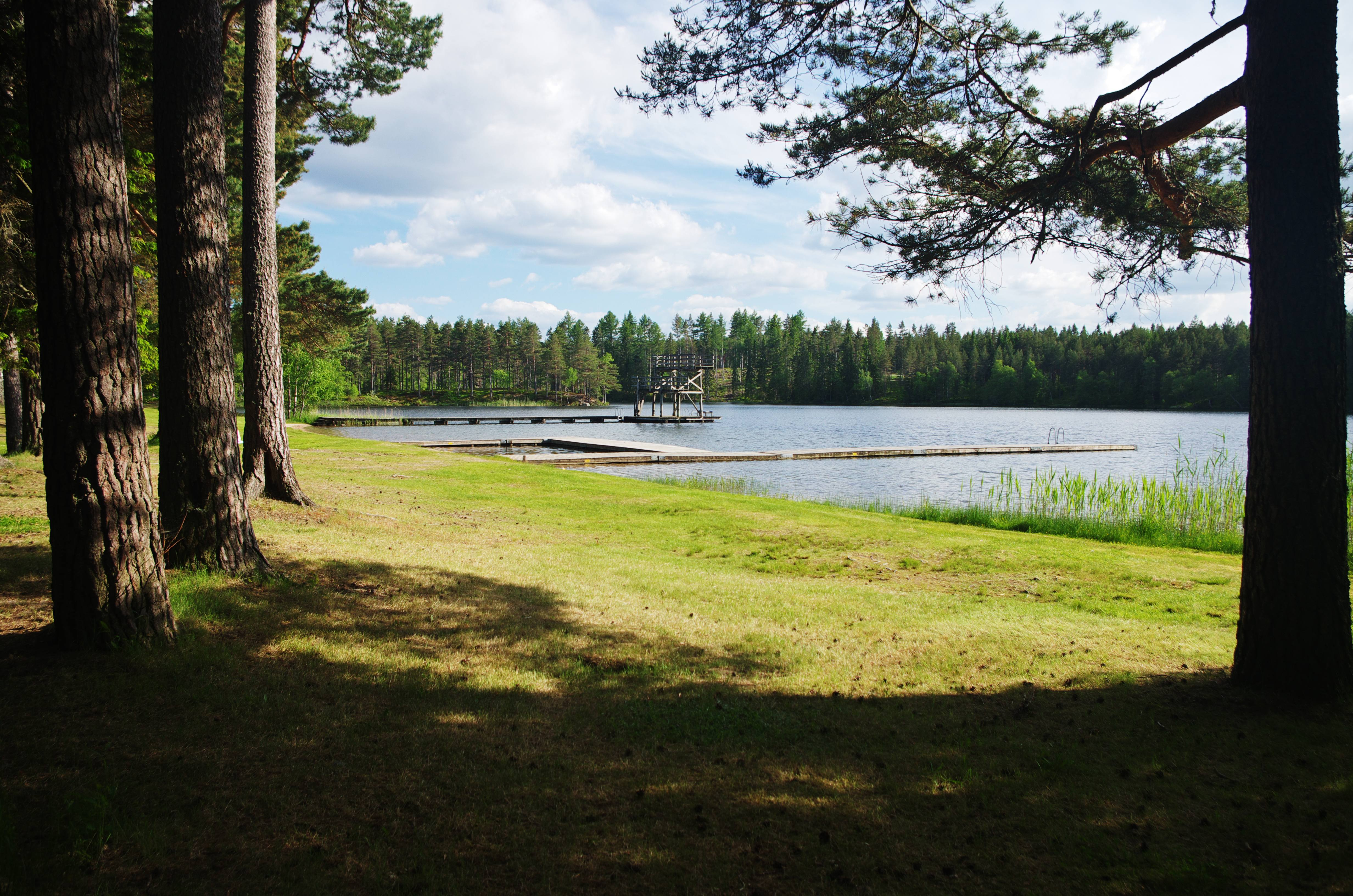 Lilla Havsjön eller Lilla Havssjön är en badsjö på Hökensås i Tidaholms kommun i Västergötland, Sverige.